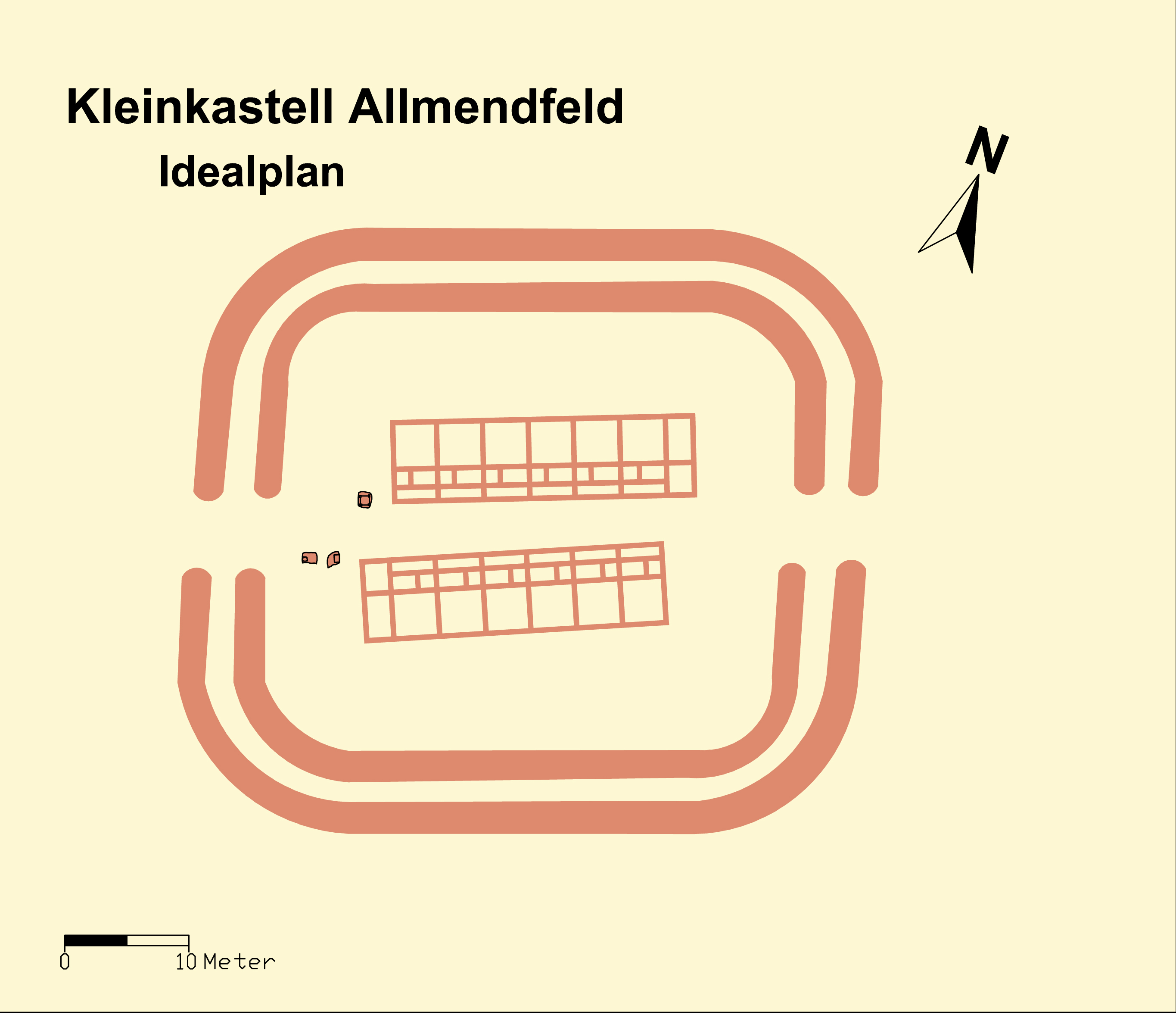 Kleinkastell Allmendfeld. Idealplan.